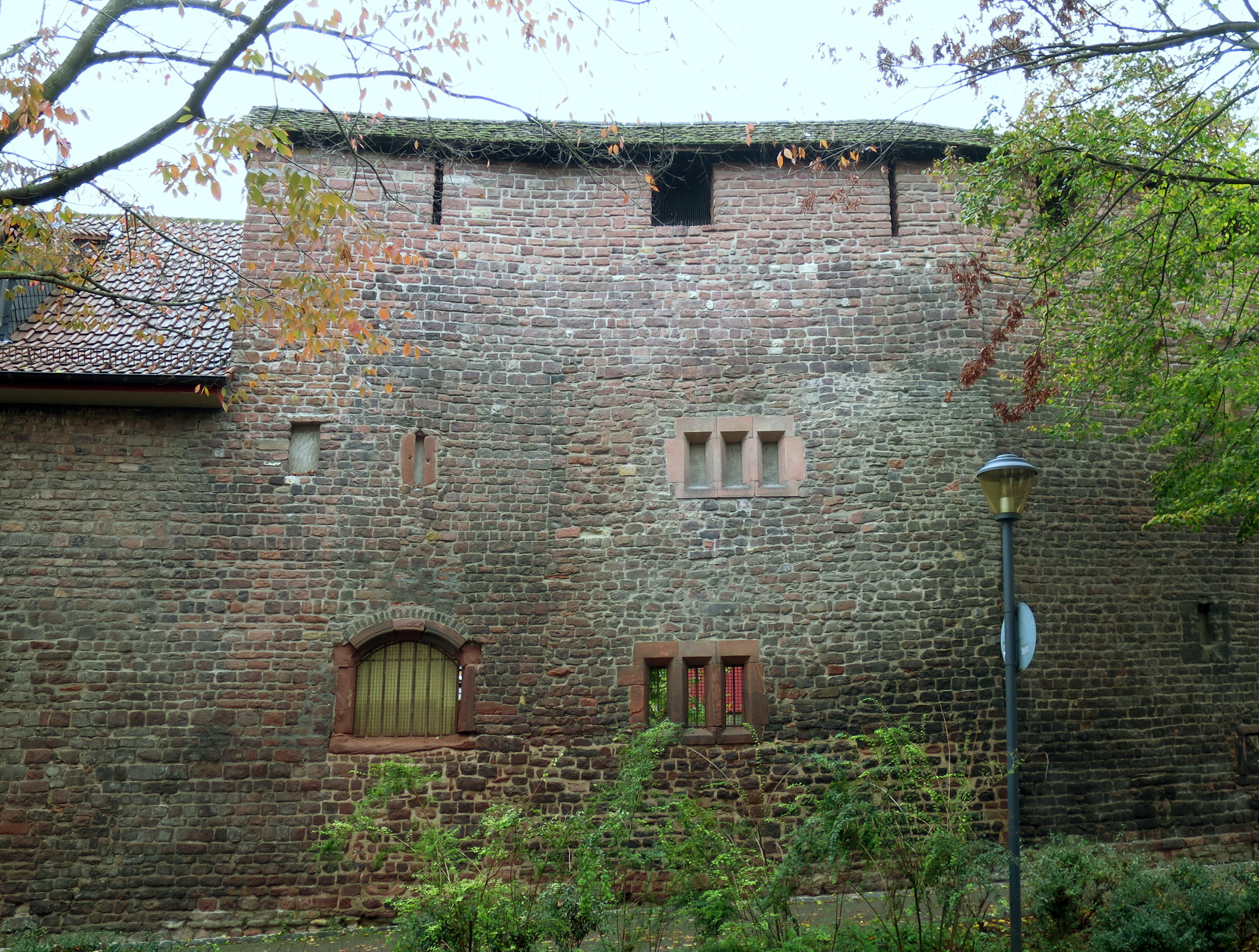 Stadtmauer Worms in der Nordanlage